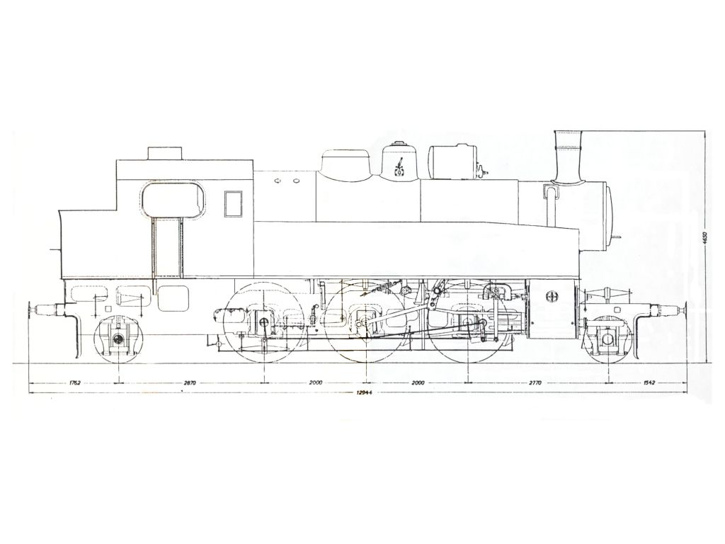 MÁV 342